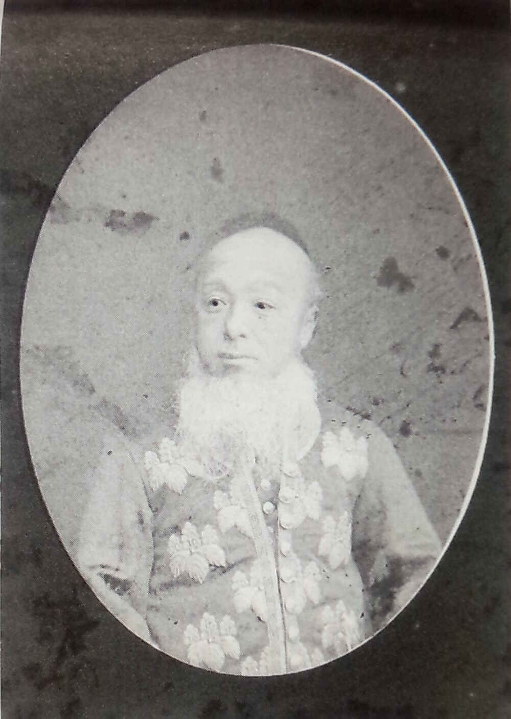 石山基文の肖像写真。